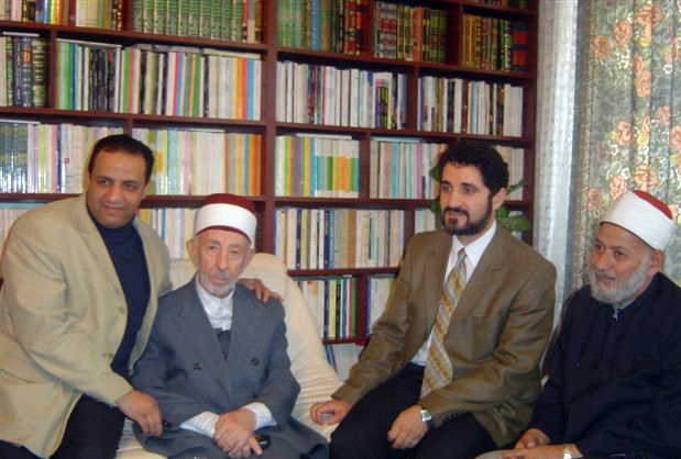 د. البوطى يتوسط الإعلامى أيمن وهدان .. و د. عدنان إبراهيم و د. محمود عبده فيينا 2013